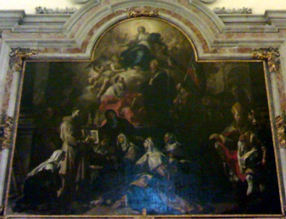 Chiesa di San Girolamo delle Monache (Napoli) - Dipinto di Francesco Solimena Gloria di Maria Assunta e santi (1705 circa)